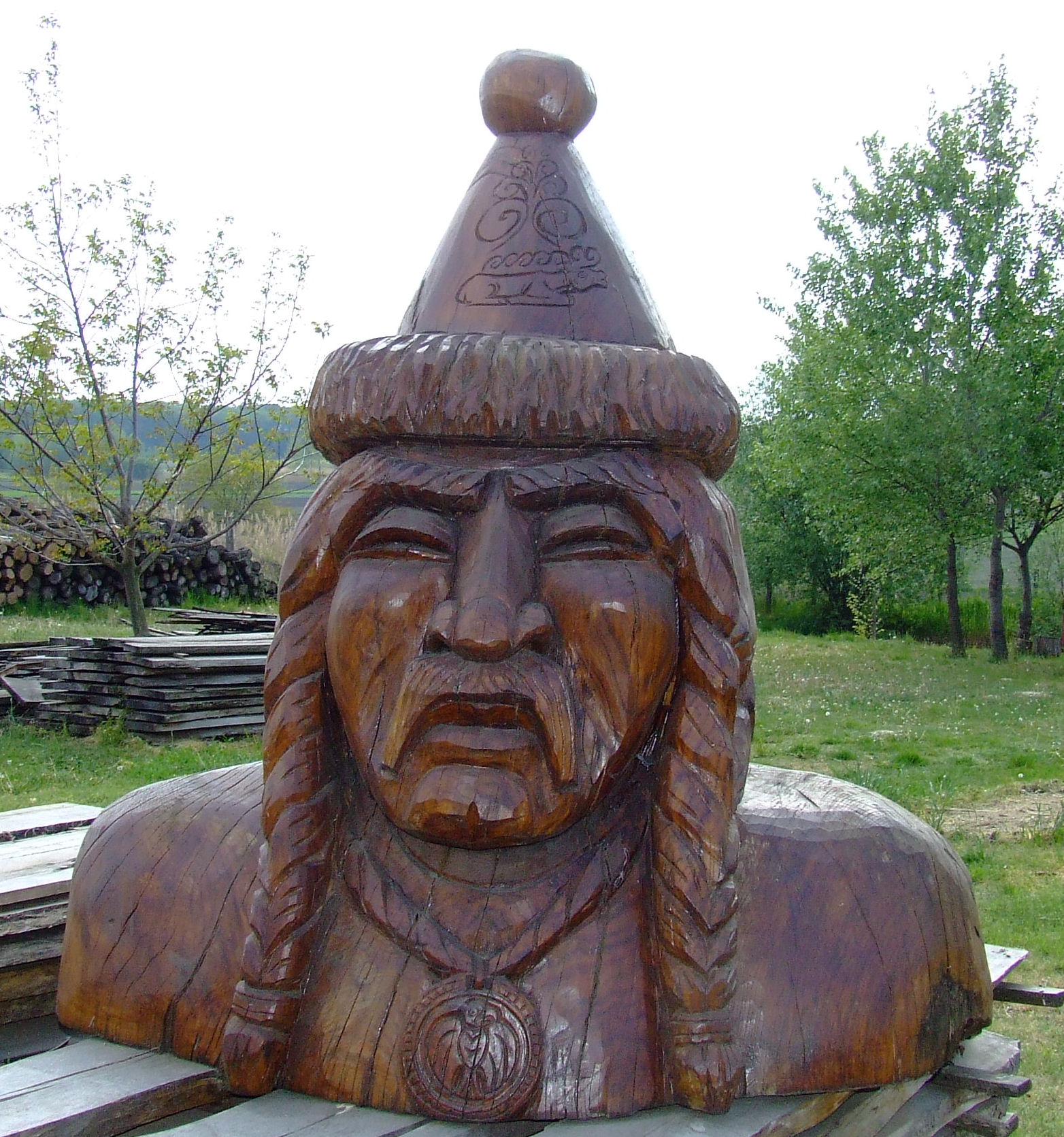 Csanád vezér szobra Érsekcsanádon. Mónus Béla alkotása